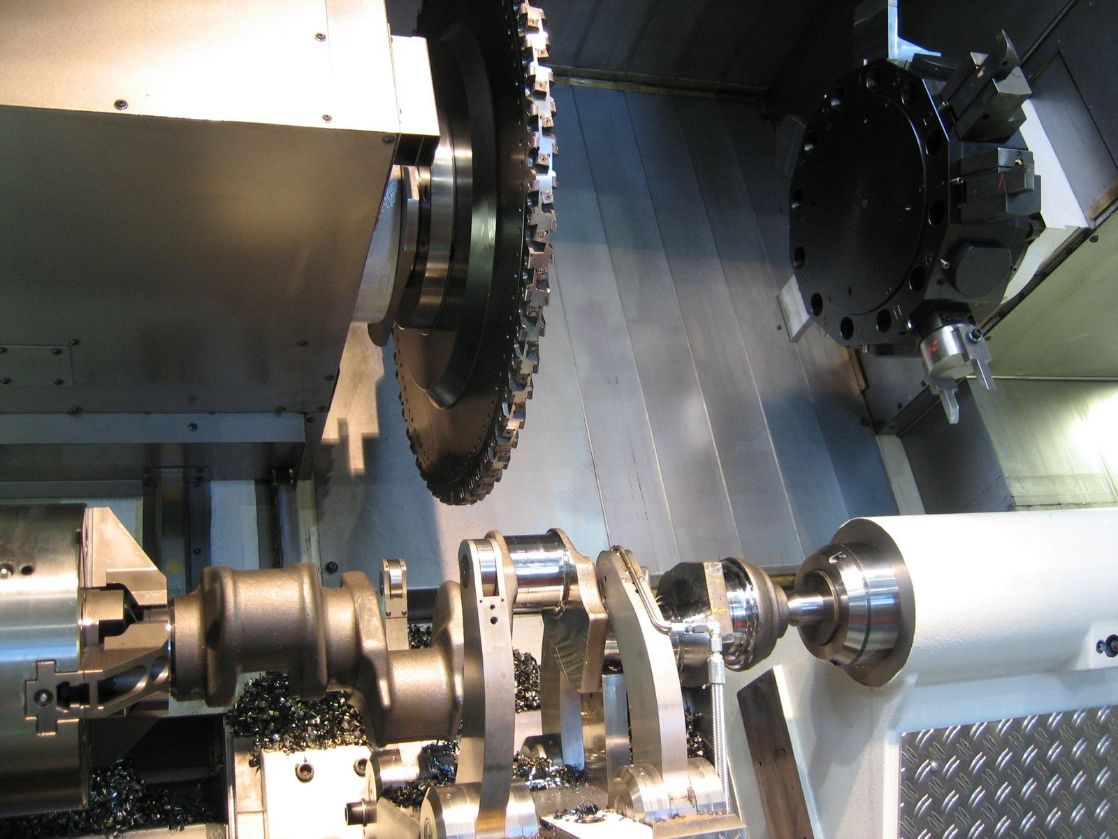 Groot stalen product, een kruk-as, in bewerking op een gereedschapswerktuig. Het materiaal van een kruk-as is een gelegeerde staalsoort